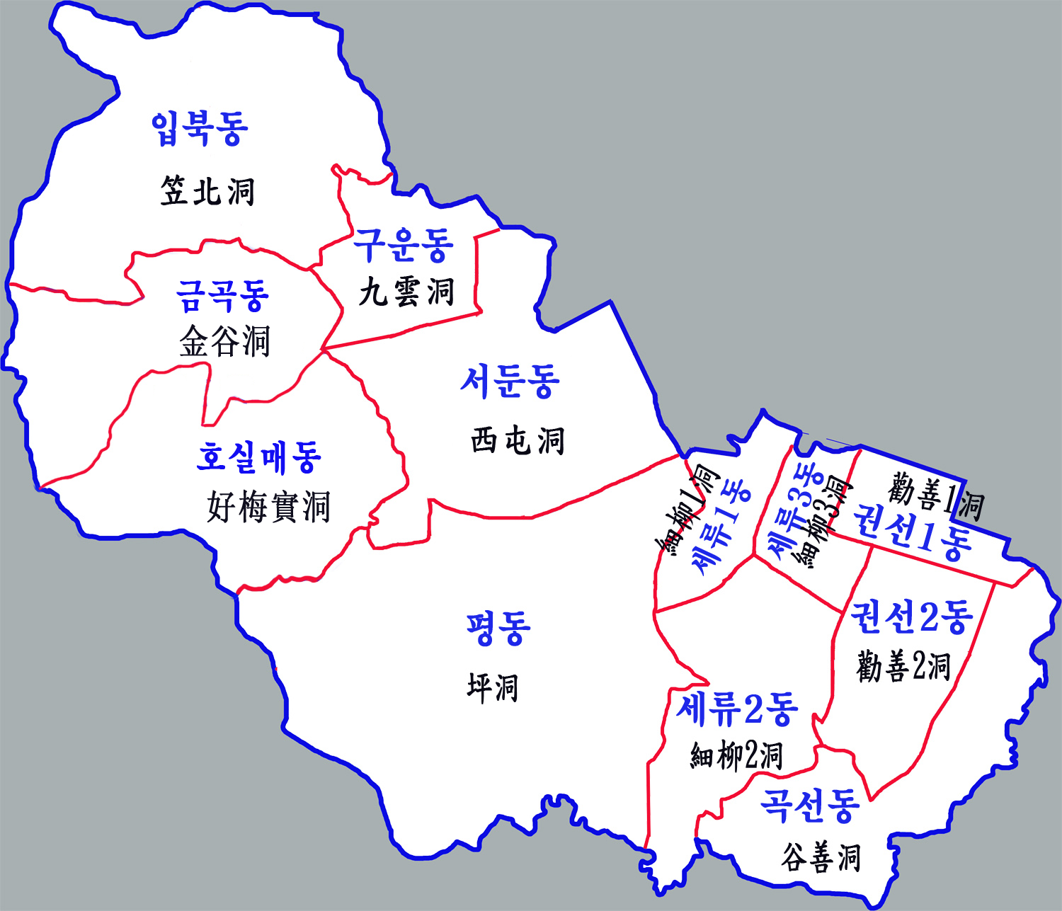 권선구지도